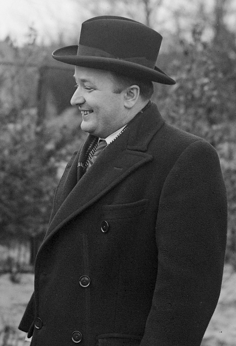 Boturinck en Russische ambassadeur Valkov